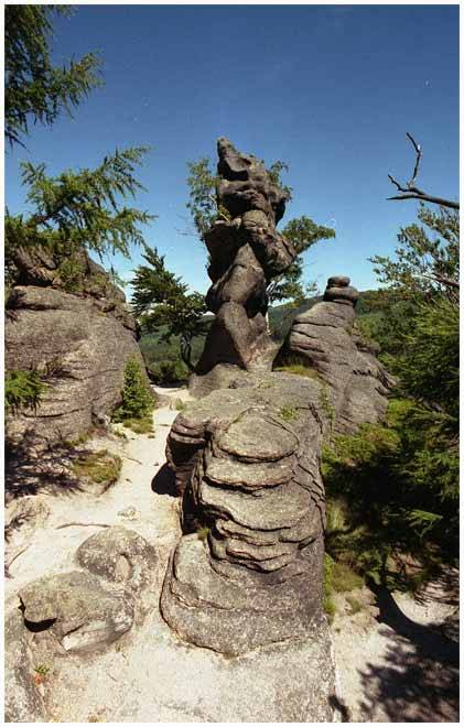 Obrázek ze skalního města Starościeńskie Skały